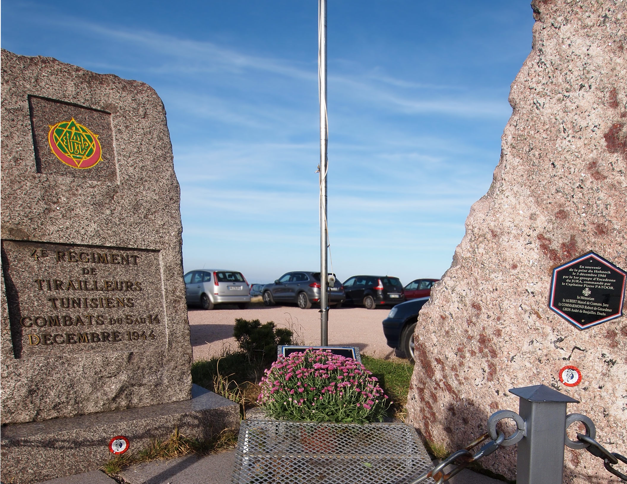 Denkmal für das tunesische Schützenregiment in der französischen Armee auf dem Hohneck